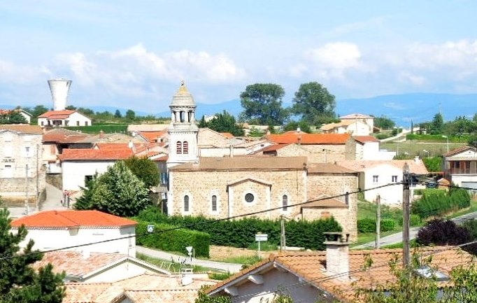 Talencieux village